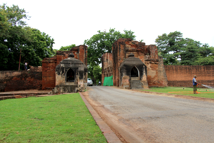 မြန်မာဘာသာ: သရပါတံခါး(ပုဂံ)